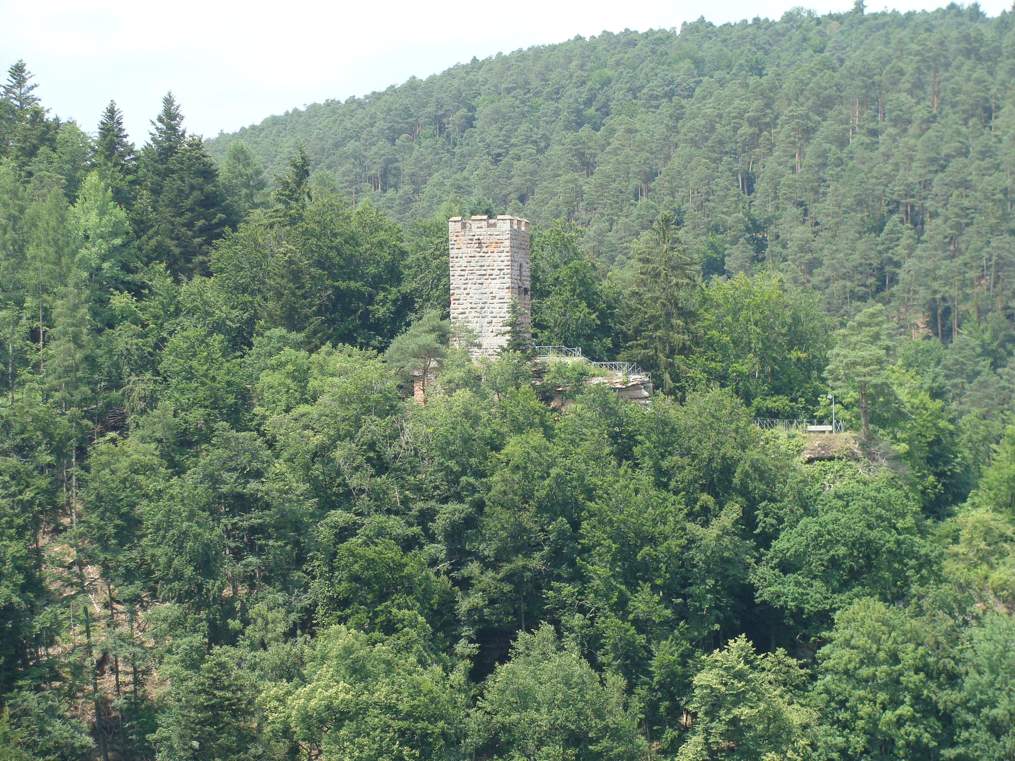 Burg Erfenstein im Speyerbachtal (Pfälzerwald)